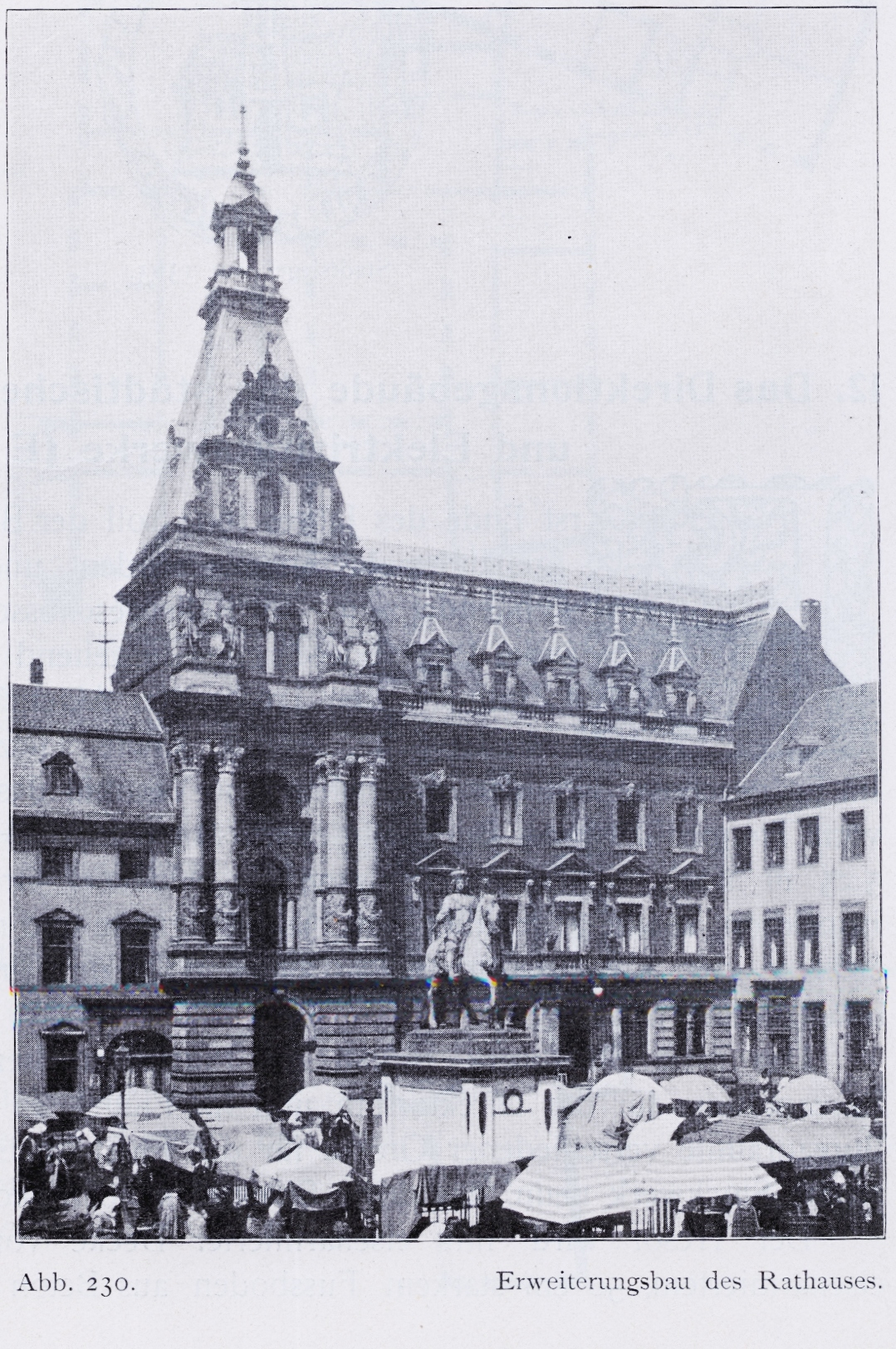 Neues Rathaus in Düsseldorf (Torso) Detail, erbaut 1884 von Stadtbaumeister Eberhard Westhofen